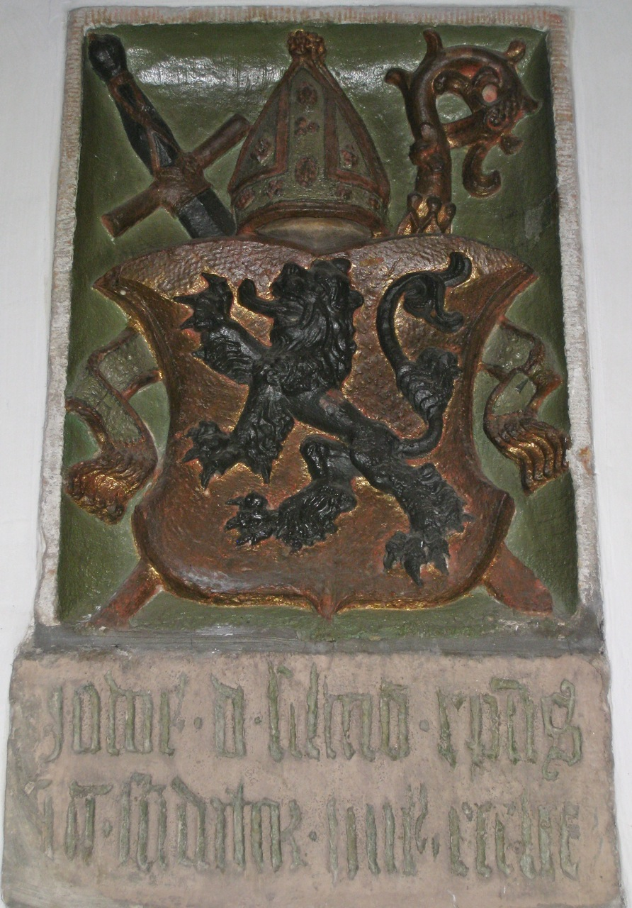 Wappentafel des Jodocus von Silenen im alten Chor der von ihm gegründeten Pfarrkirche Leukerbad (Relief bemalt: steigender Löwe mit den bischöflichen Insignien Schwert, Mitra und Bischofsstab). Inschrift in gotischer Textura (Abkürzungen aufgelöst): Jodocus de silinon episcopus // ?et fundator huius ecclesie.